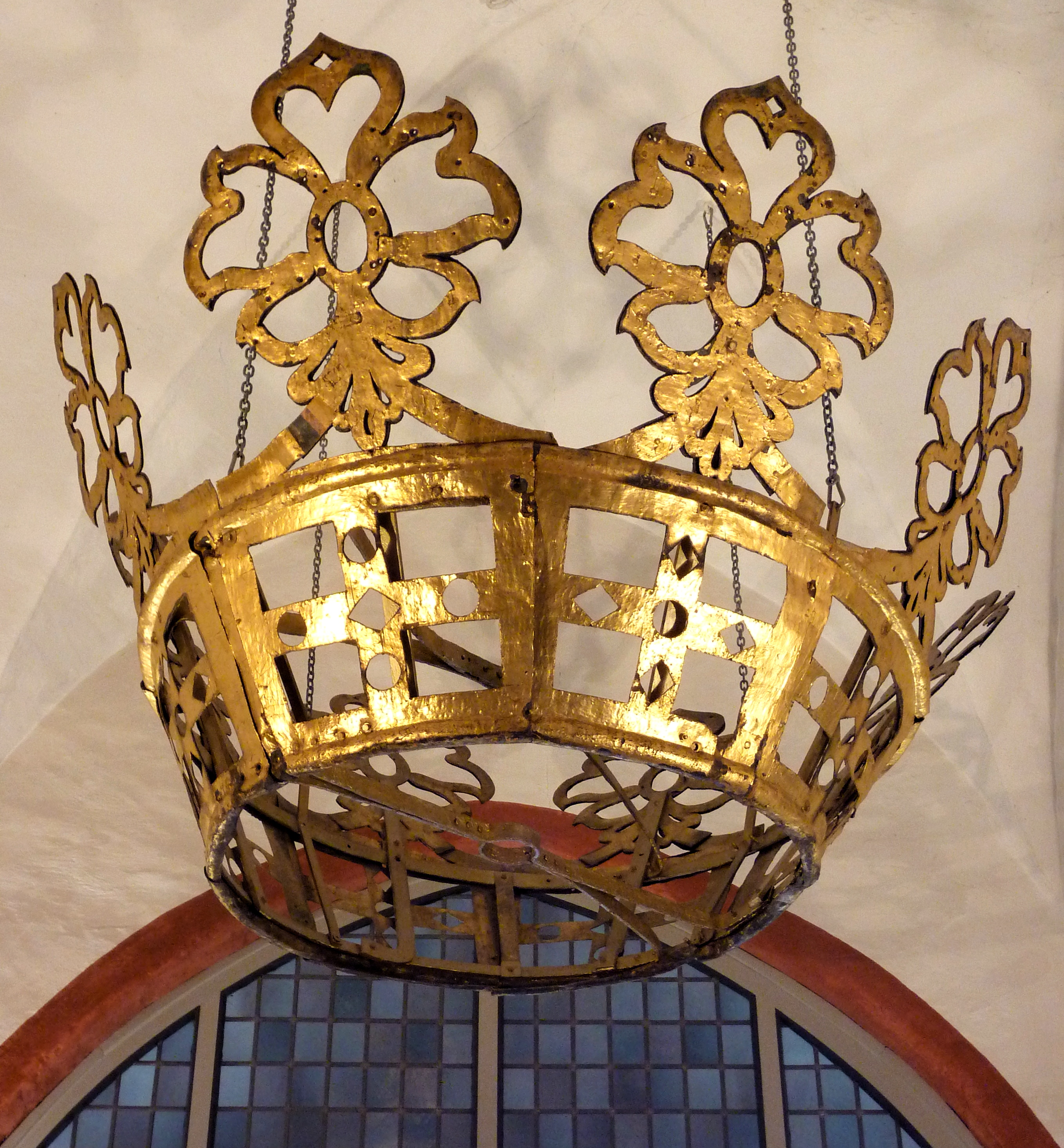 Evangelische Nikolaikirche in Siegen/Westfalen: Das Original des Krönchens, 1652 von Fürst Johann Moritz zu Nassau-Siegen gestiftetes Wahrzeichen der Stadt, ist heute im Hauptportal der Kirche aufgehängt. Auf dem Dach der Kirche steht seit 1993 eine Kopie. Durchmesser der Krone etwa 2,35 m.